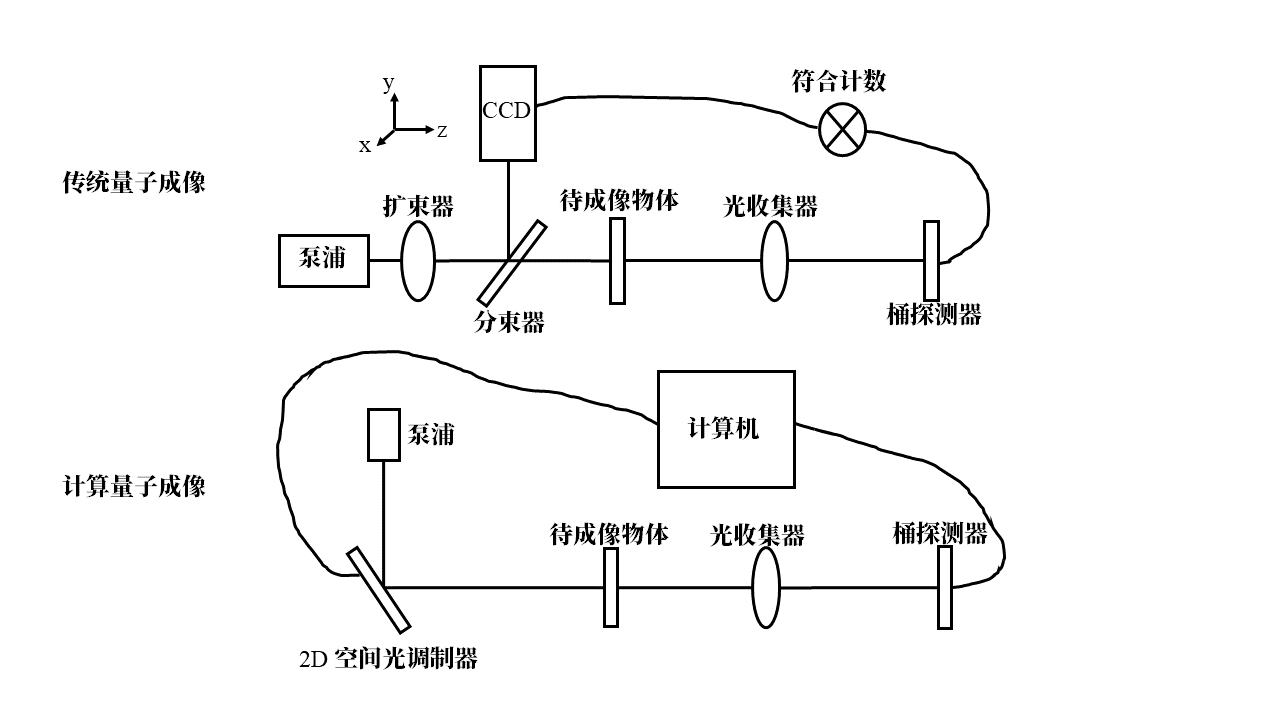 一幅图像，描绘了传统量子成像的常见设备和计算量子成像的常见设备。